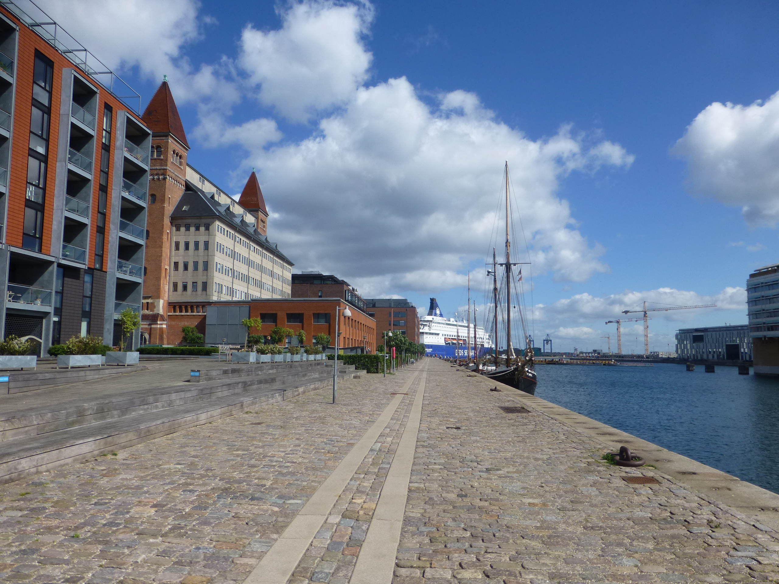 The wharf Amerikakaj in Østerbro in Copenhagen.